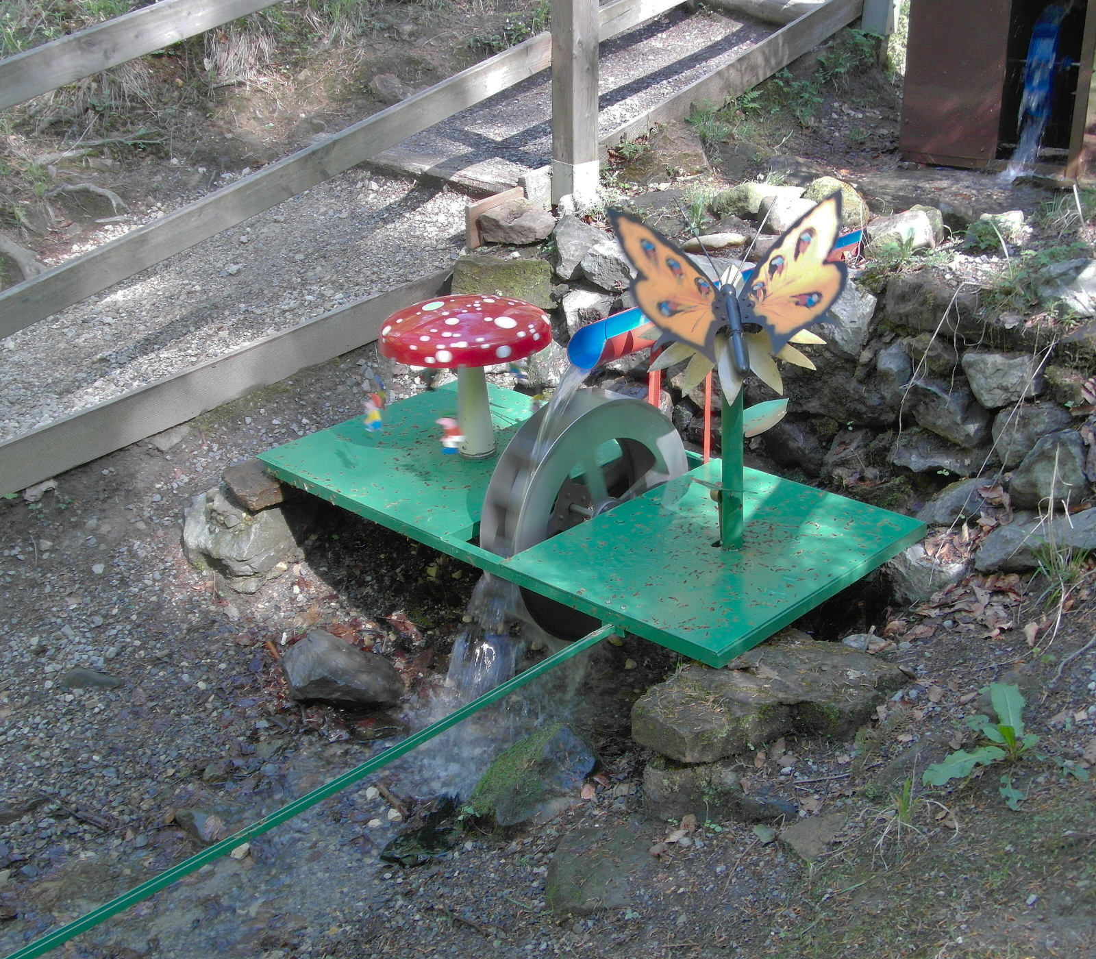 Die Modelle der Wennigser Wasserräder werden jährlich in oft überarbeitetem Design aufgebaut. Das Modell Kettenkarussell treibt auch den Schmetterling und die Zwergenschaukel an.